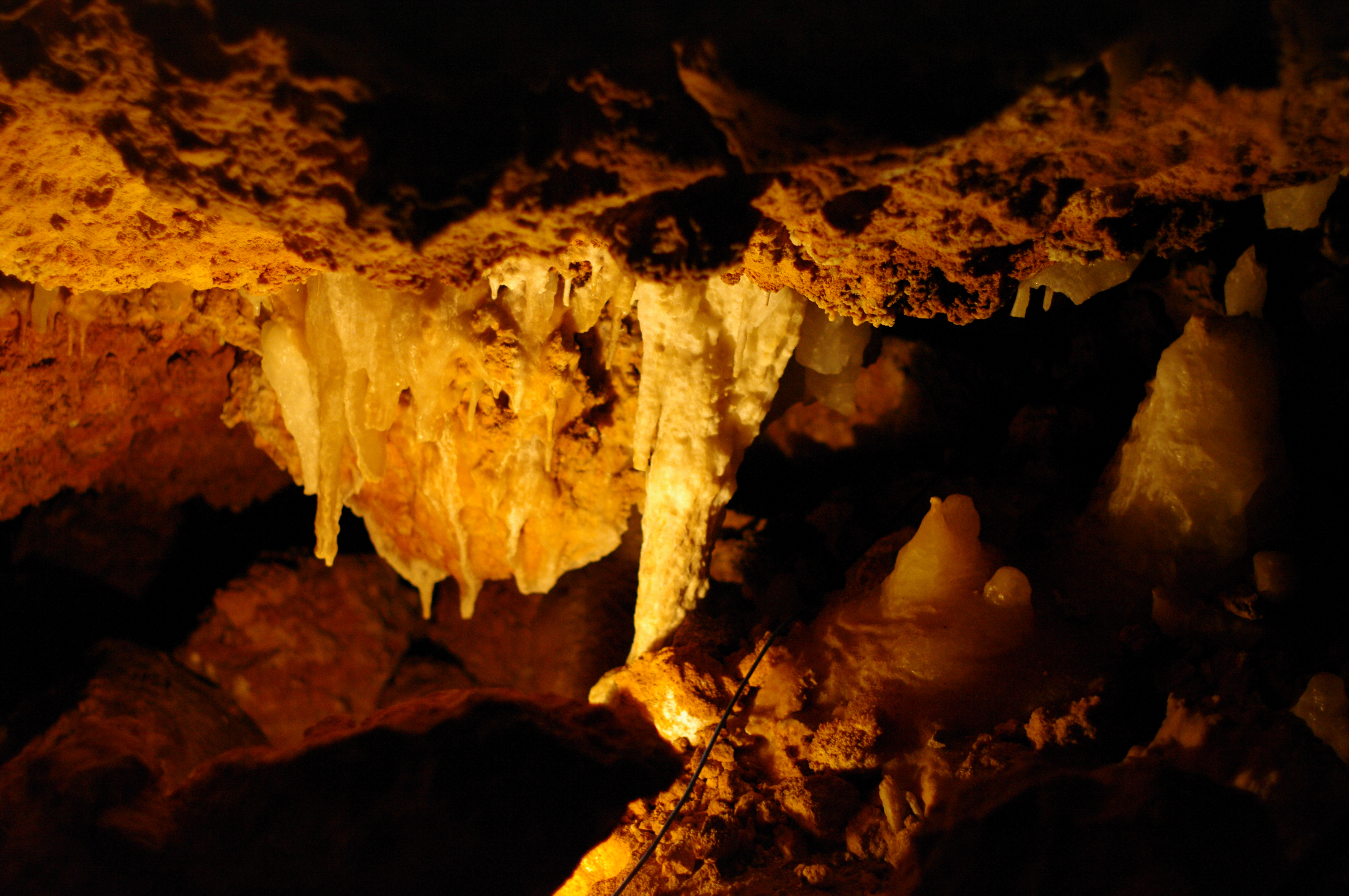 Ngilgi Cave